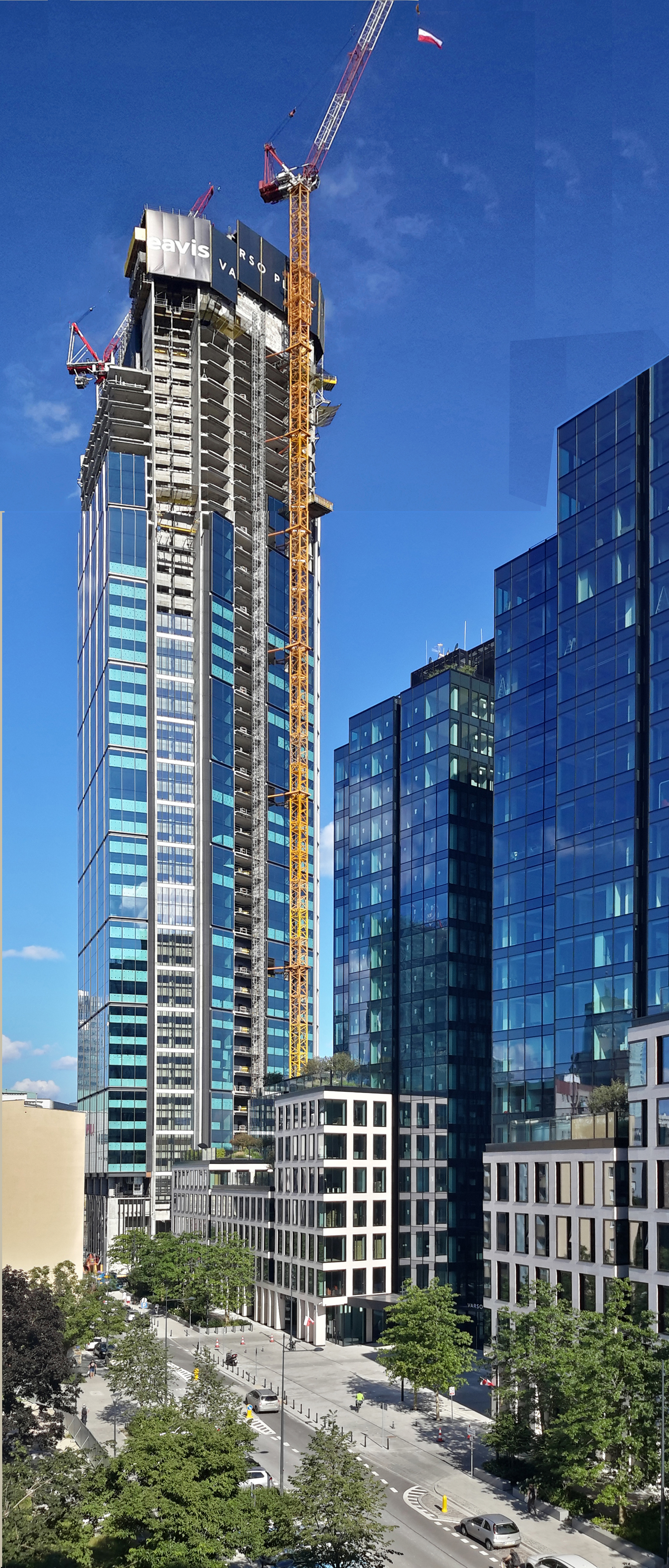 Plac budowy Varso 1 sierpnia 2020